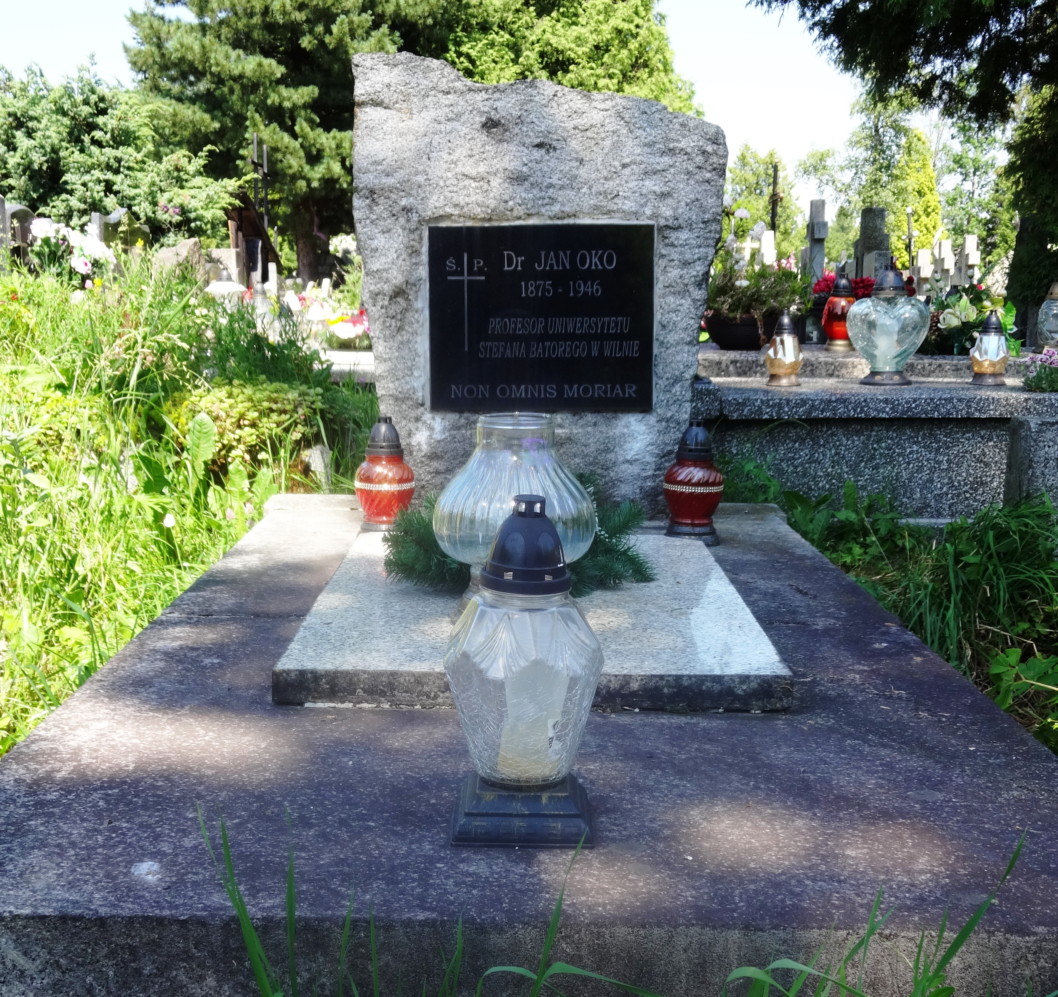 New Cemetery in Zakopane